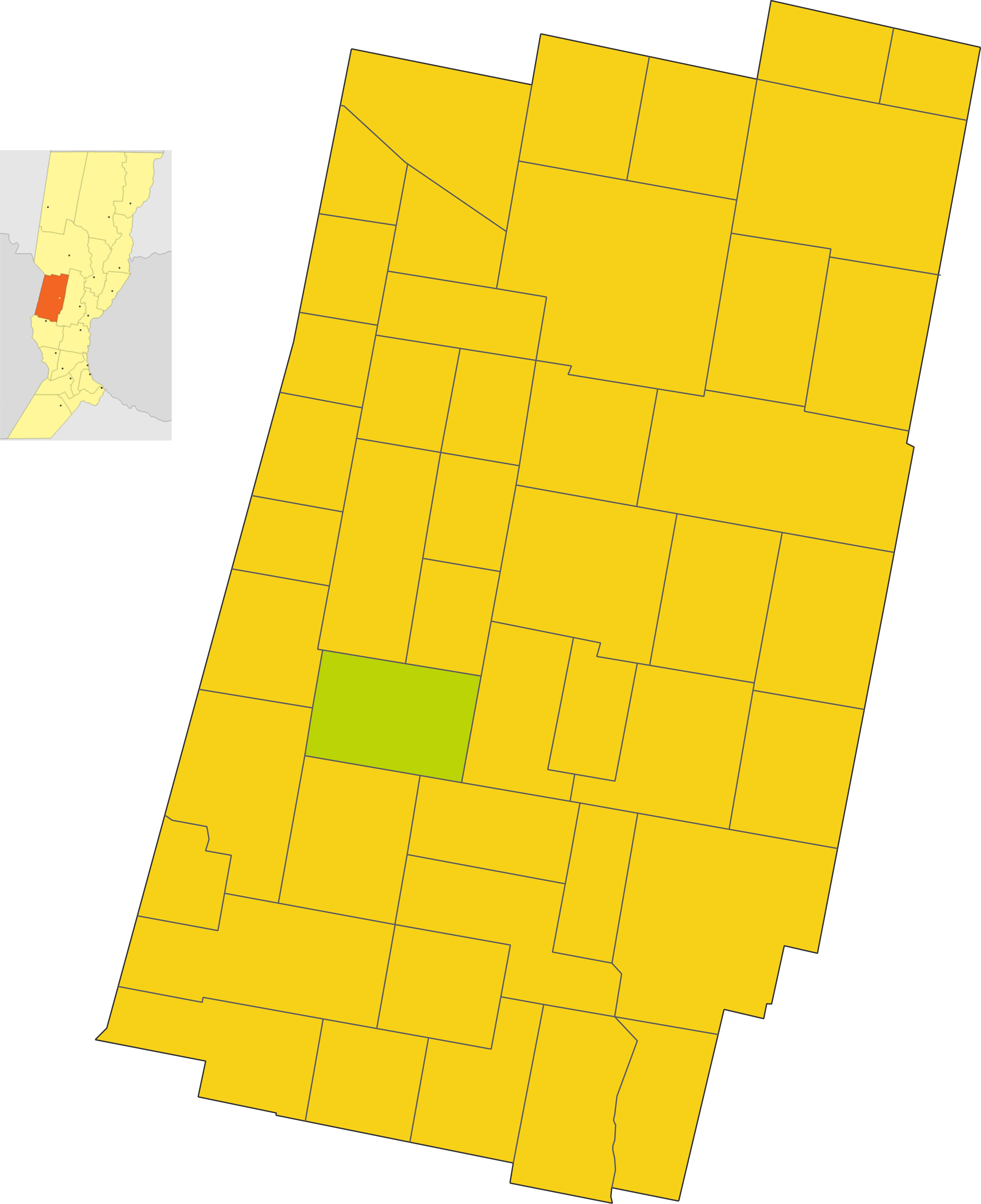 Map of the Comuna de Santa Clara de Saguier in Castellanos department, Santa Fe province, Argentina